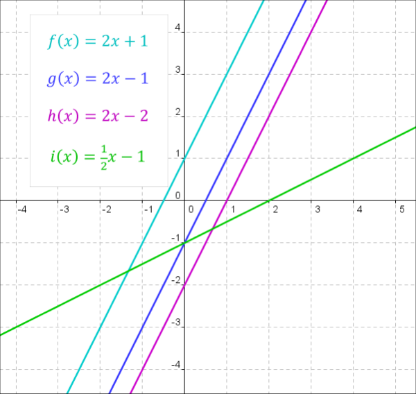 Lineaarinen funktio